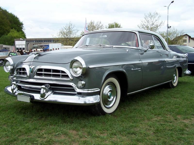 2012 Trasadingen CH Amitreffen